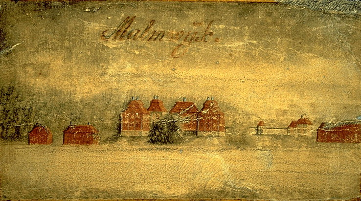 Malmvik Carl Gripenhielm 1689